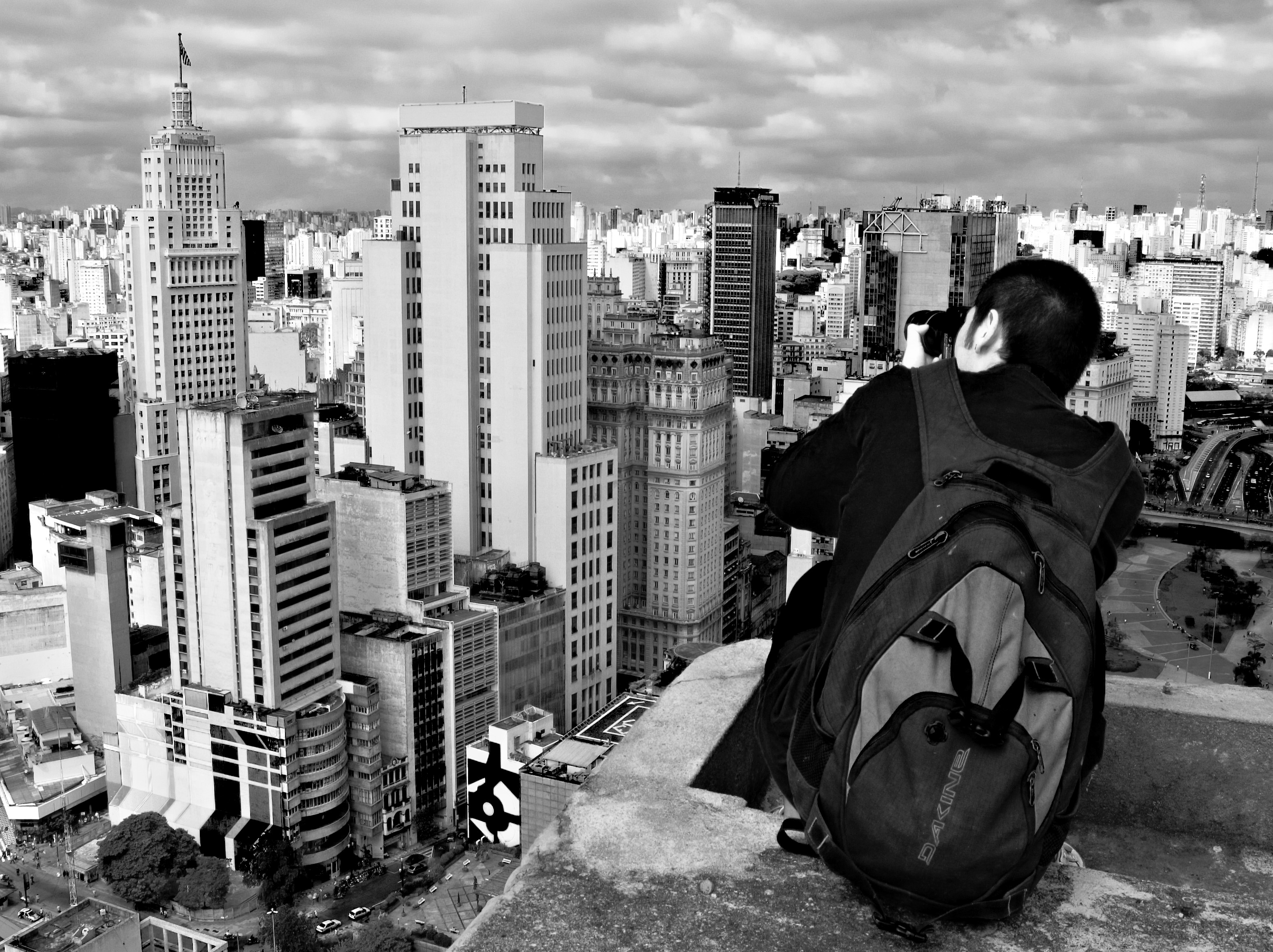 Fotografand São Paulo.